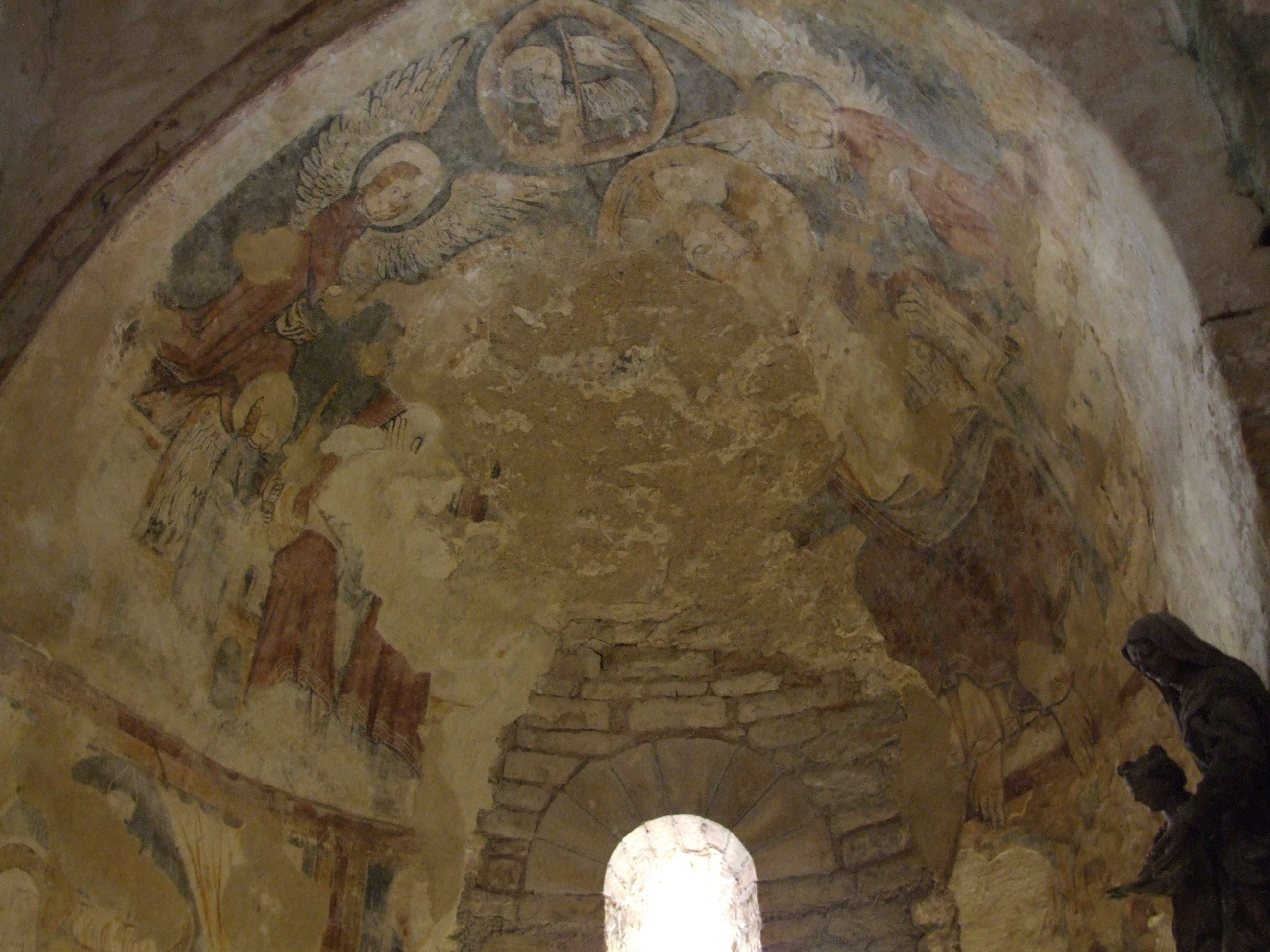 Église Saint-Pierre, Brancion, Saône-et-Loire, Bourgogne, FRANCE